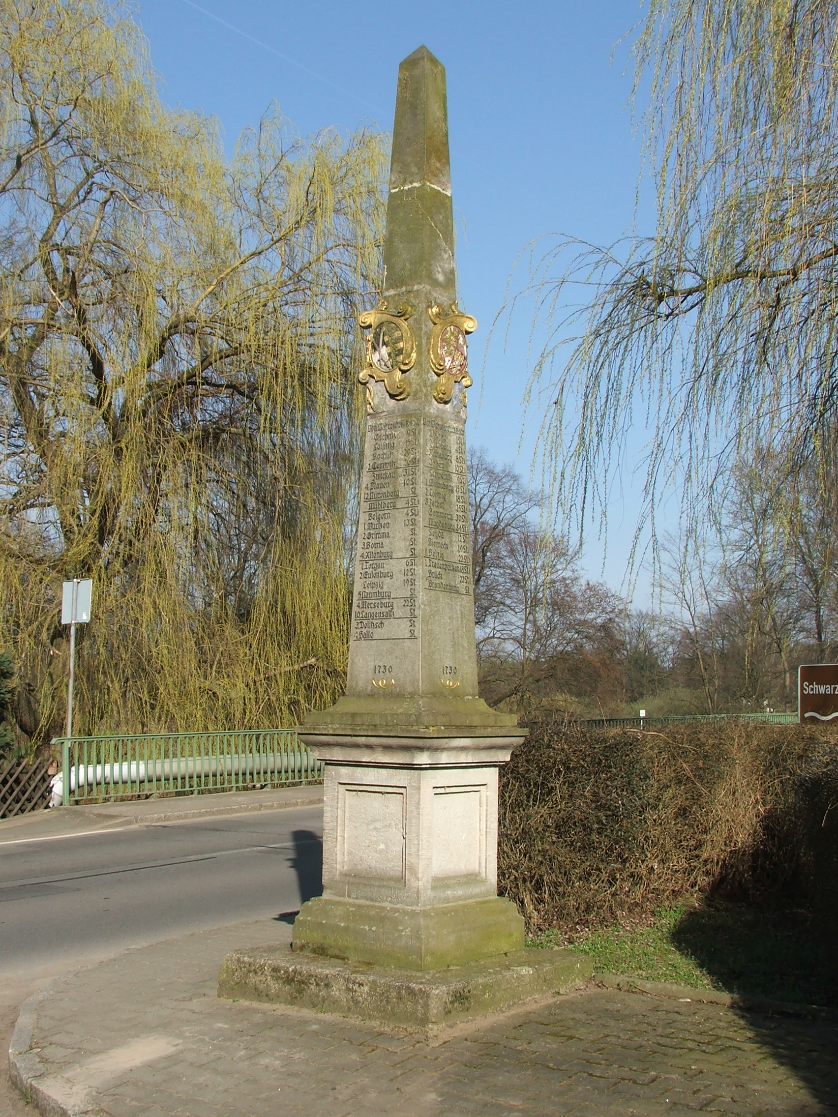 Kursächsische Postsäule in Wahrenbrück